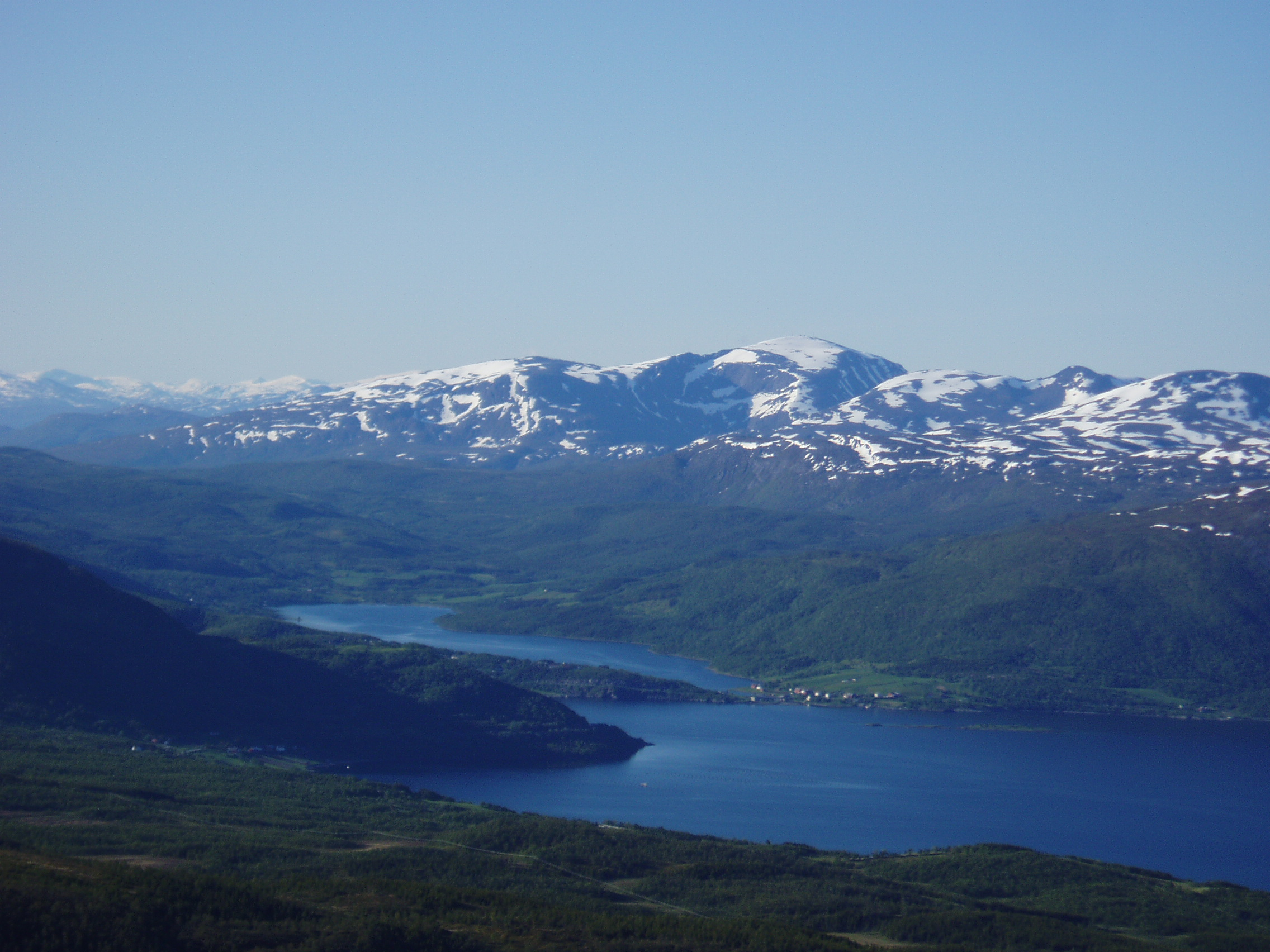 Straumsbotn, fjordarm som er en forlengelse av Kvæfjorden, Kvæfjord kommune. Straumen er en tidevannsstrøm, og vannet innenfor er brakkvann. Sett fra Raudmoldheia. Det høyeste fjellet på bildet er Sætertinden i Tjeldsund kommune.